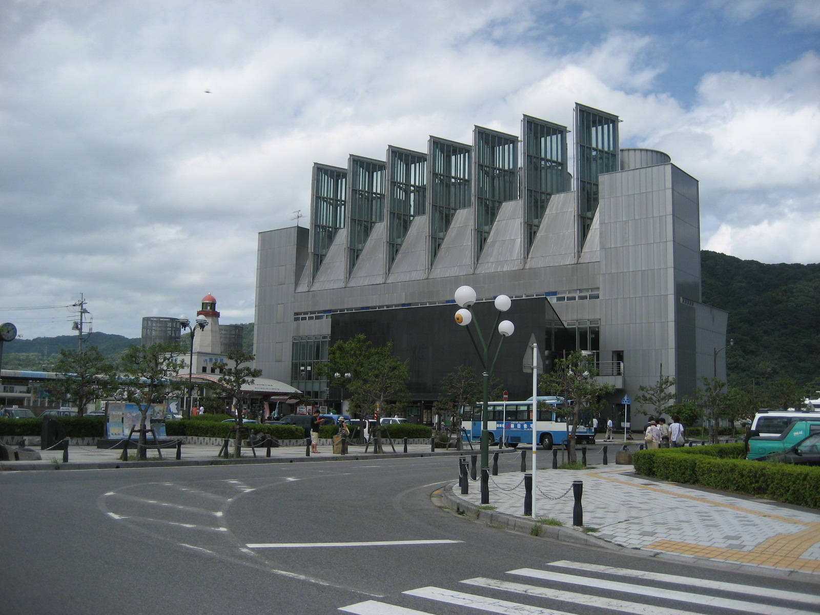 Minatosakai Community Building